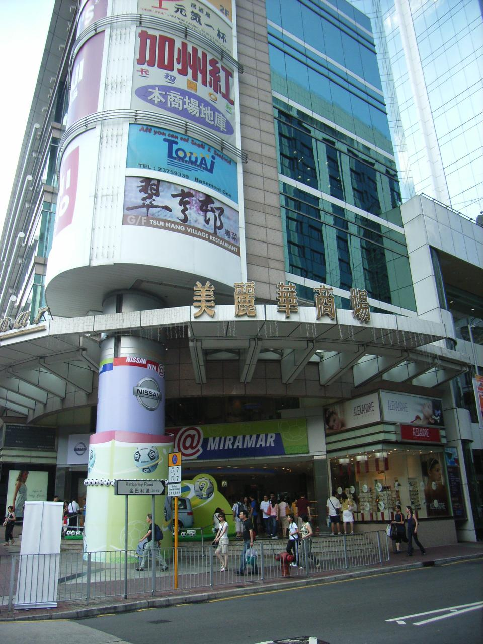 Tsim Sha Tsui, Kowloon, Hong Kong Photo by TonySKTO